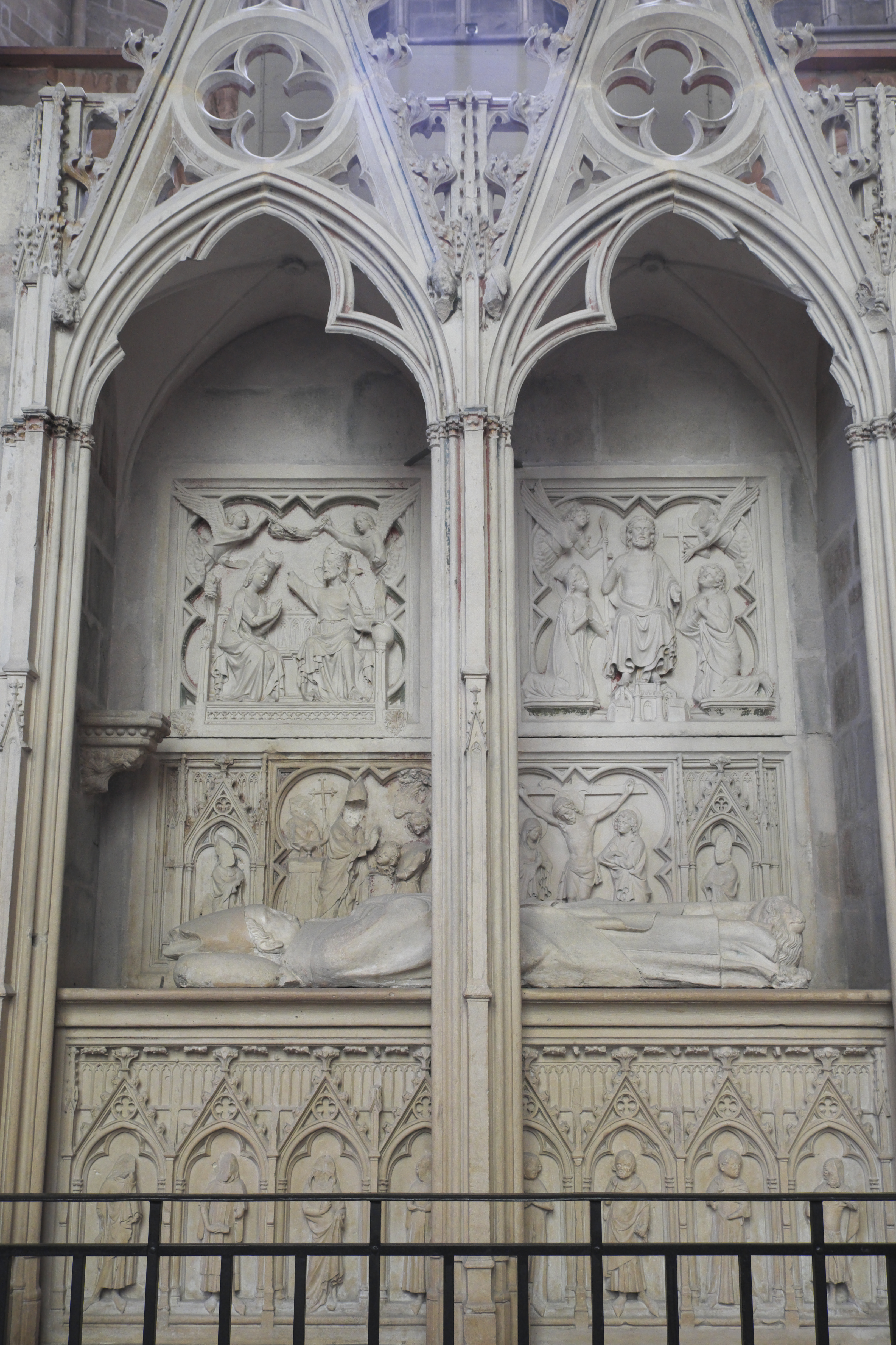 Kathedrale Saint-Étienne in Limoges im Département Haute-Vienne (Nouvelle-Aquitaine/Frankreich), Grabmal von Bernard Brun